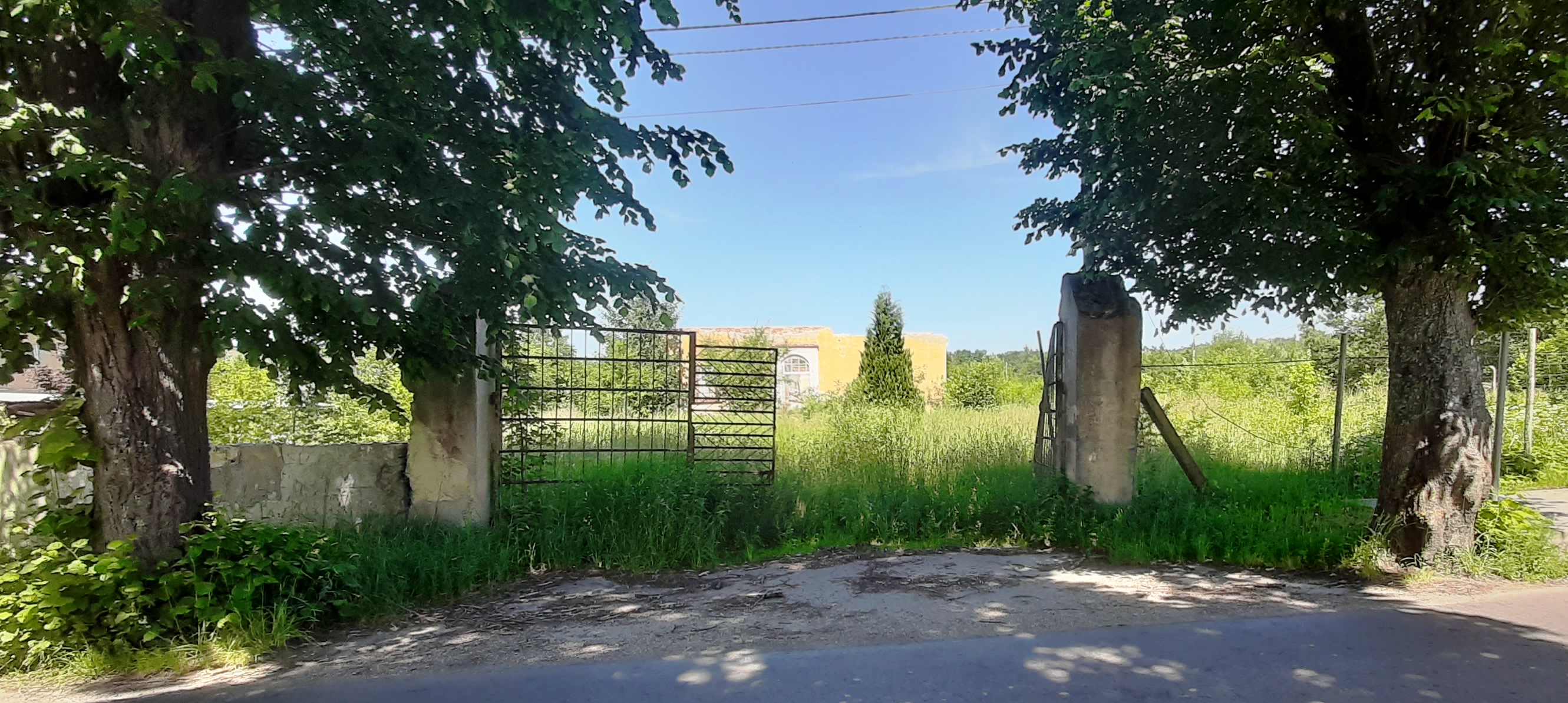 Ośrodek przystosowania społecznego zakład karny, 2020